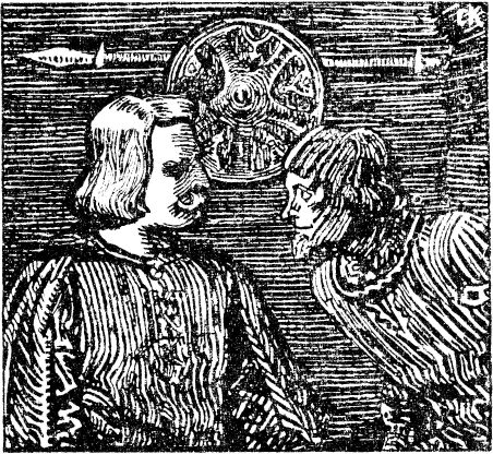 Christian Krohg: Illustration for Olav den helliges saga, Heimskringla 1899-edition. nn: «Kong Olav og Brynjolv Ulvalde talast ved i einmæle.»